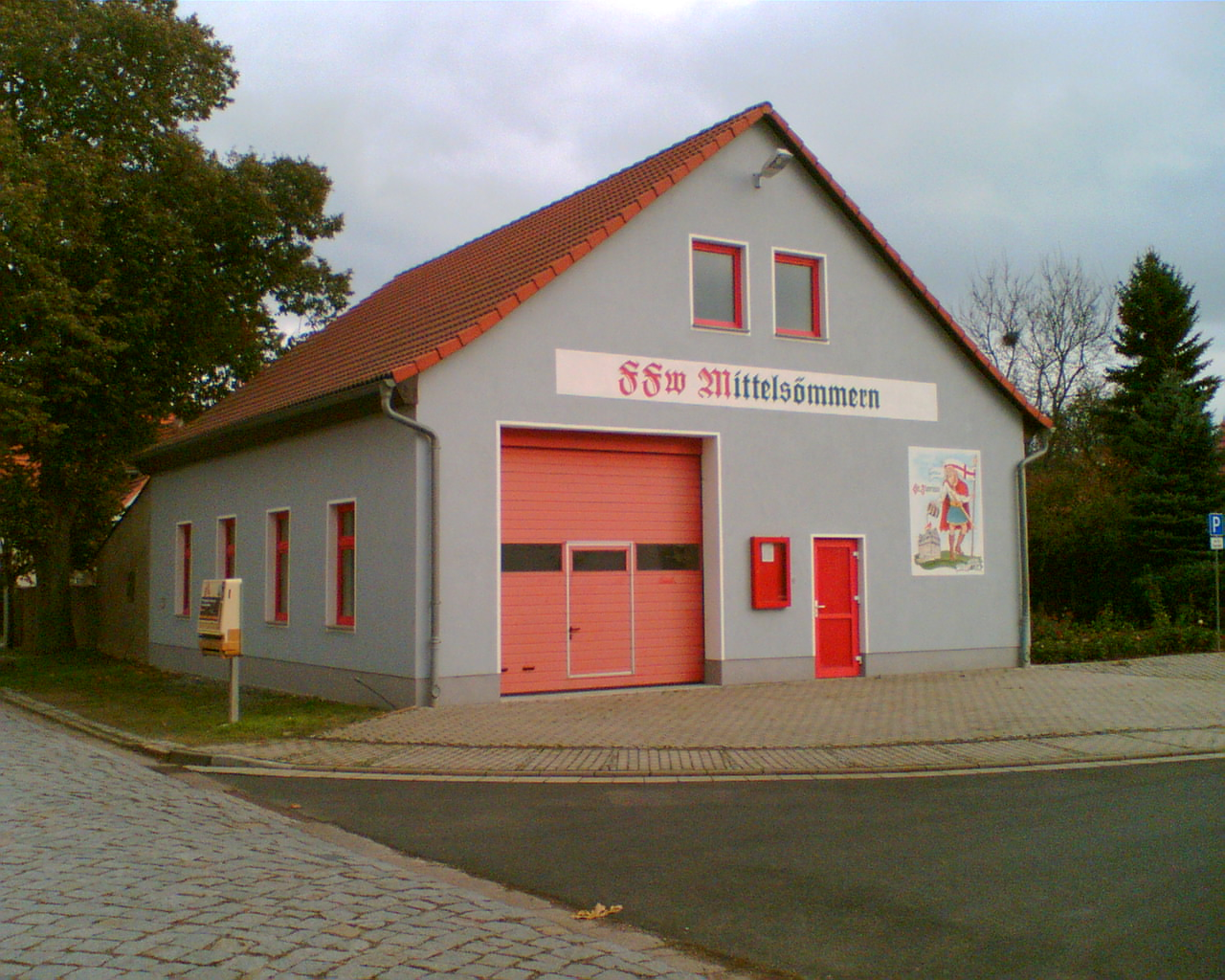 Die Feuerwehr von Mittelsömmern im nahen Ortszentrum, Stephan Heinemann, Bild selbst erstellt, 22.11.2006